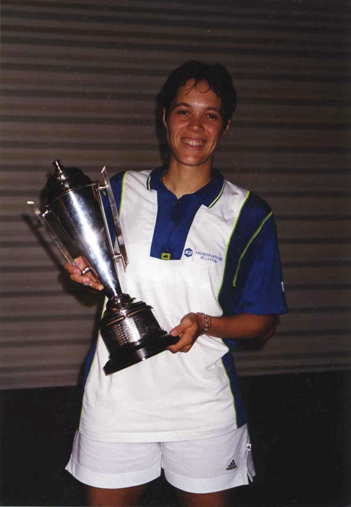 Photo Sandra DIMBOUR aux Internationaux d'Australie de Badminton - Aout 1999